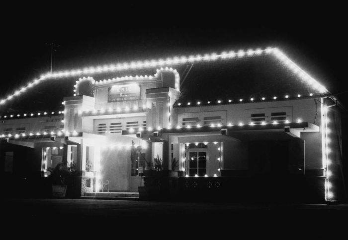 negatief. Het ter gelegenheid van Koninginnedag feestelijk verlichte stafkwartier van de KNIL en de Koninklijke Landmacht in Oost-Indonesië, Makassar